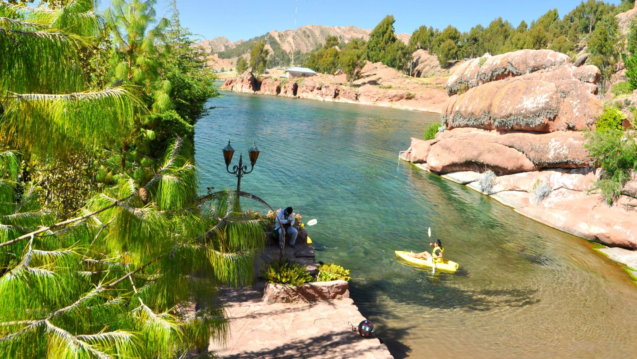 Platería Puno Peru